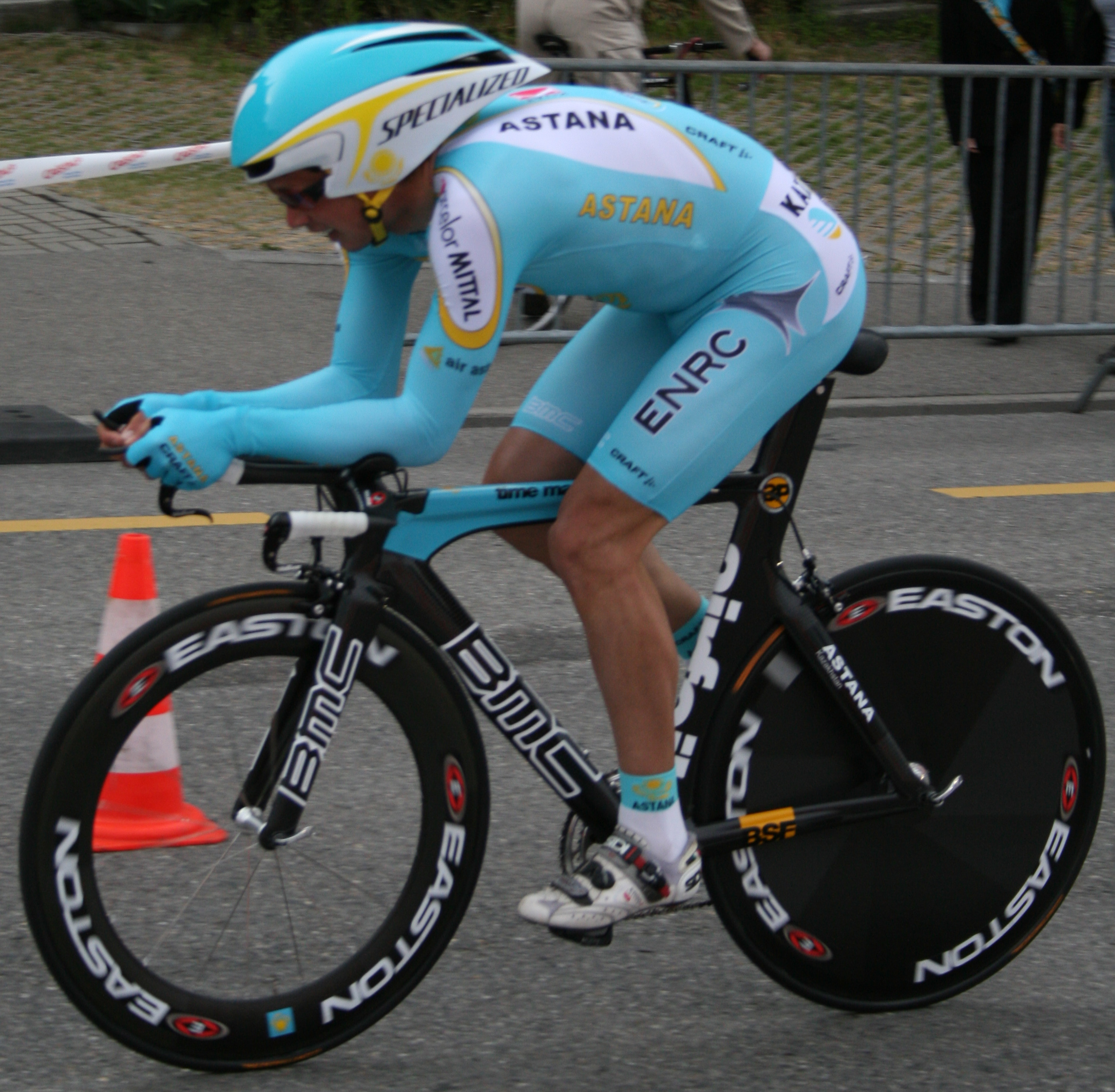 Paolo_Savoldelli prologue du Tour de Romandie 2007